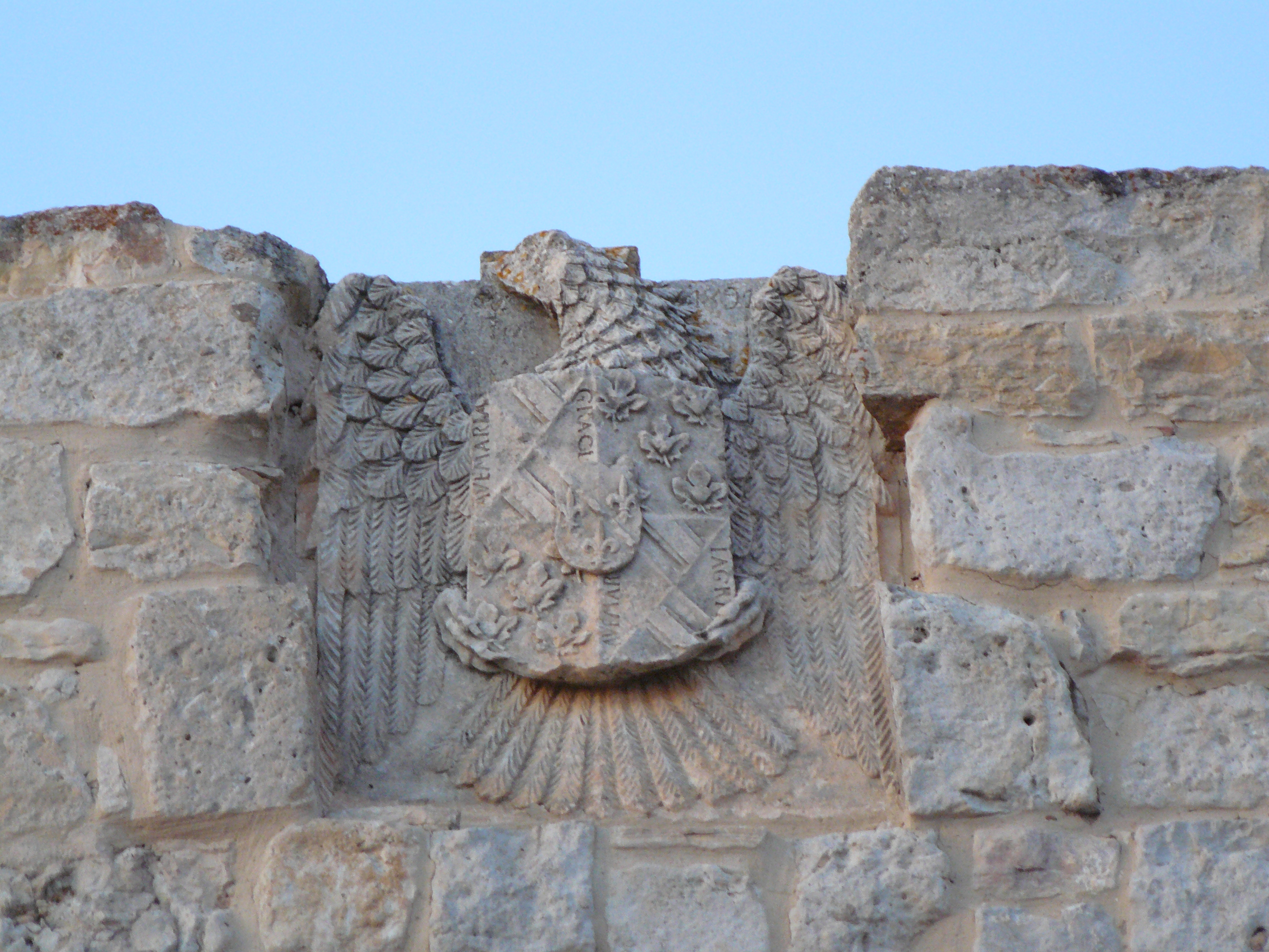 Rello, Soria.